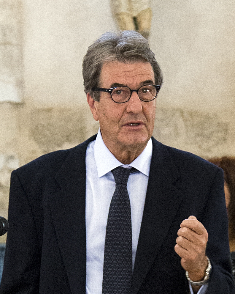 Fotografía: Ángel Cantero / 17-9-2013 - Inaugurada en el Monasterio de Santa María de Valbuena (San Bernardo). Florencio Galindo de la Vara nació en Adanero en 1947. Es doctor por la Universidad Complutense de Madrid de cuya Facultad de Bellas Artes es actualmente profesor titular.